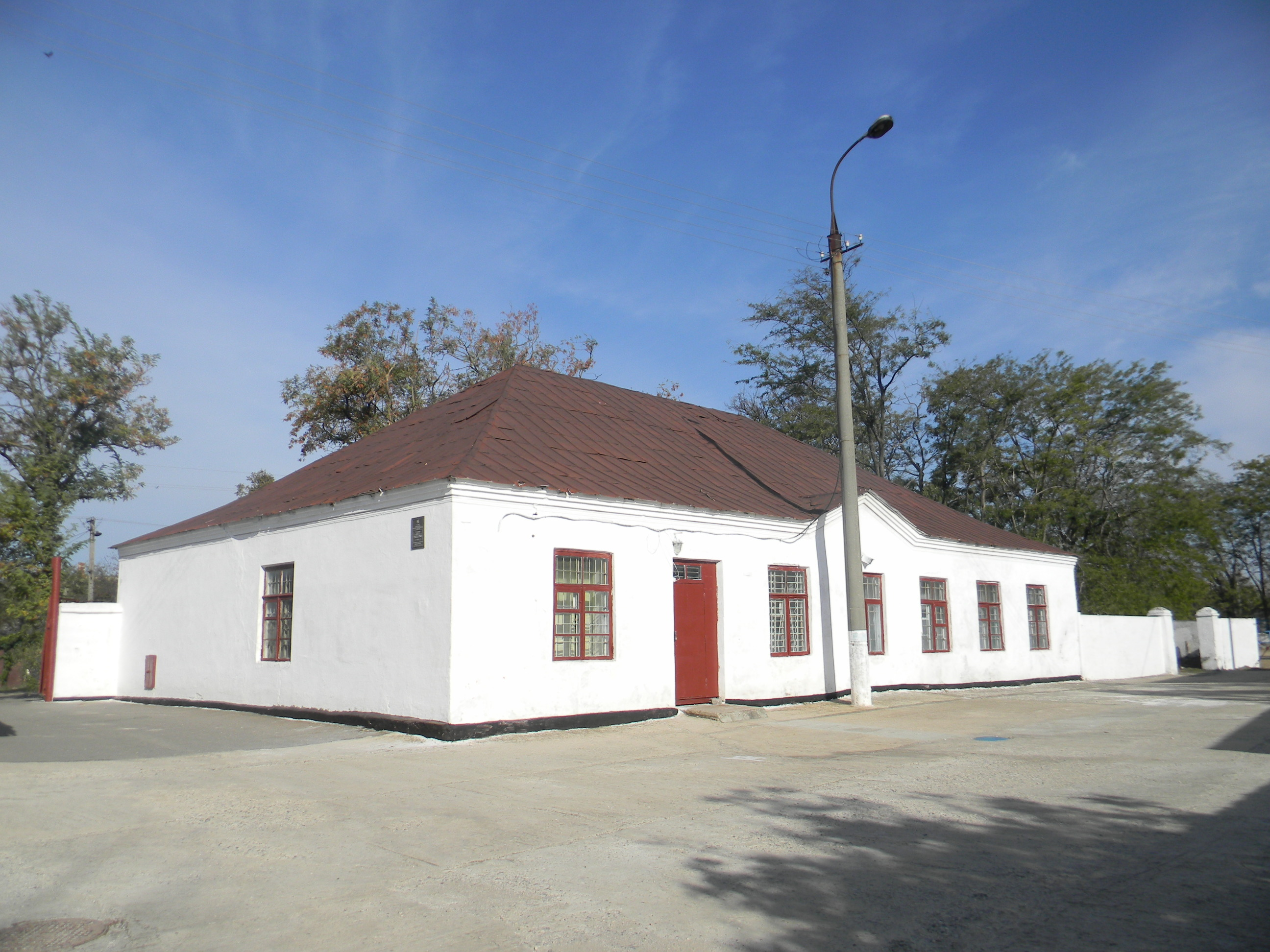 Будинок, в якому розташовувався госпіталь в період Кримської війни, Херсон, вул. Сухарна, 9